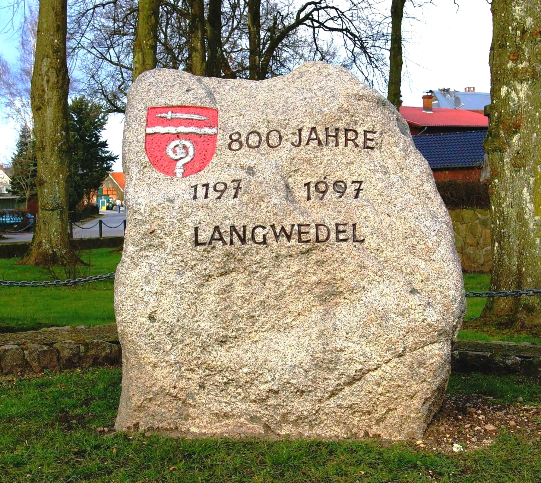 Monolith mit Ortswappen: 1997 an der Hörn aufgestellt, zur Dorfstraße von Langwedel (Holstein) gerichtet.